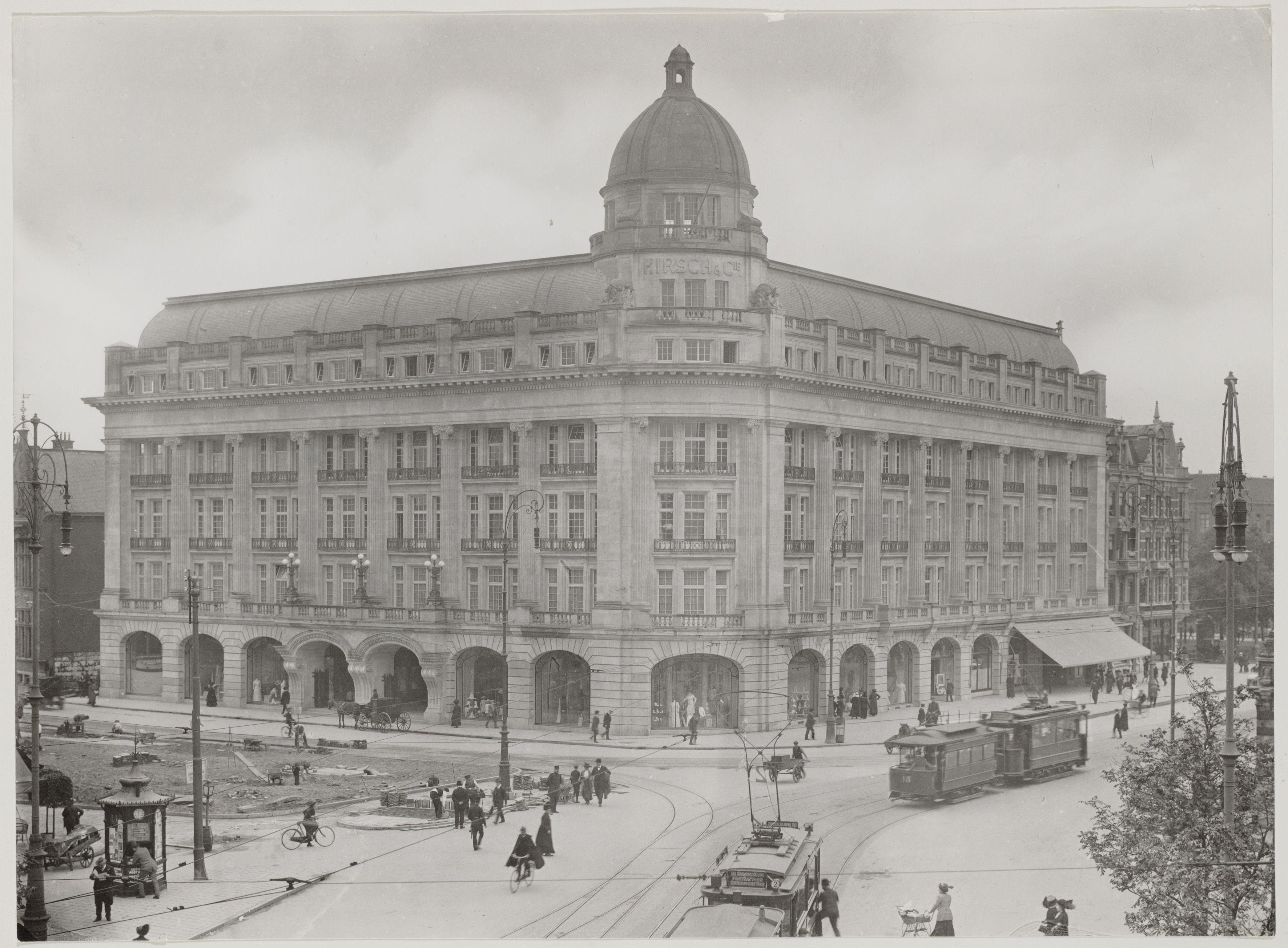 Beschrijving Leidseplein 23-35 (rechts, v.l.n.r.) Links: gebouw Hirsch & Cie., Kleine-Gartmanplantsoen 2-4 (architect: A. Jacot 1864-1925) en demping Lijnbaansgracht Documenttype foto Vervaardiger Merkelbach, Atelier J. Collectie Collectie Atelier J. Merkelbach Datering 1913 Geografische naam Leidseplein Kleine-Gartmanplantsoen Inventarissen Afbeeldingsbestand B00000002710 Generated with Dememorixer